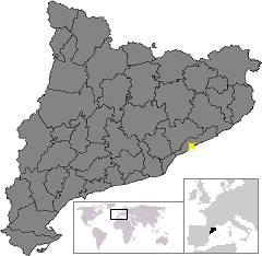 Localització de Mataró. Location of Mataró in Catalonia.